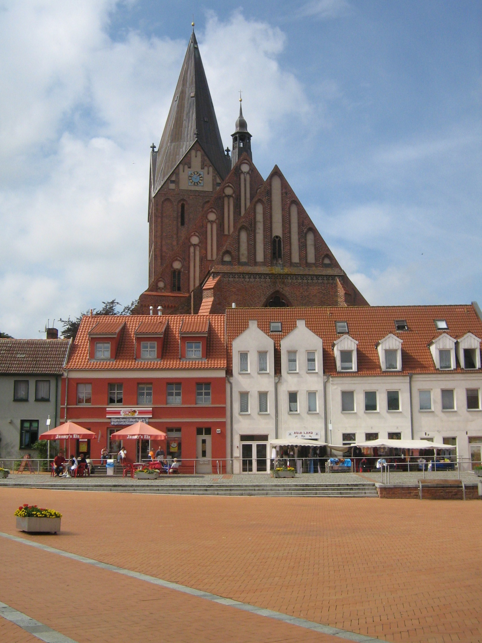 Marktplatz von Barth